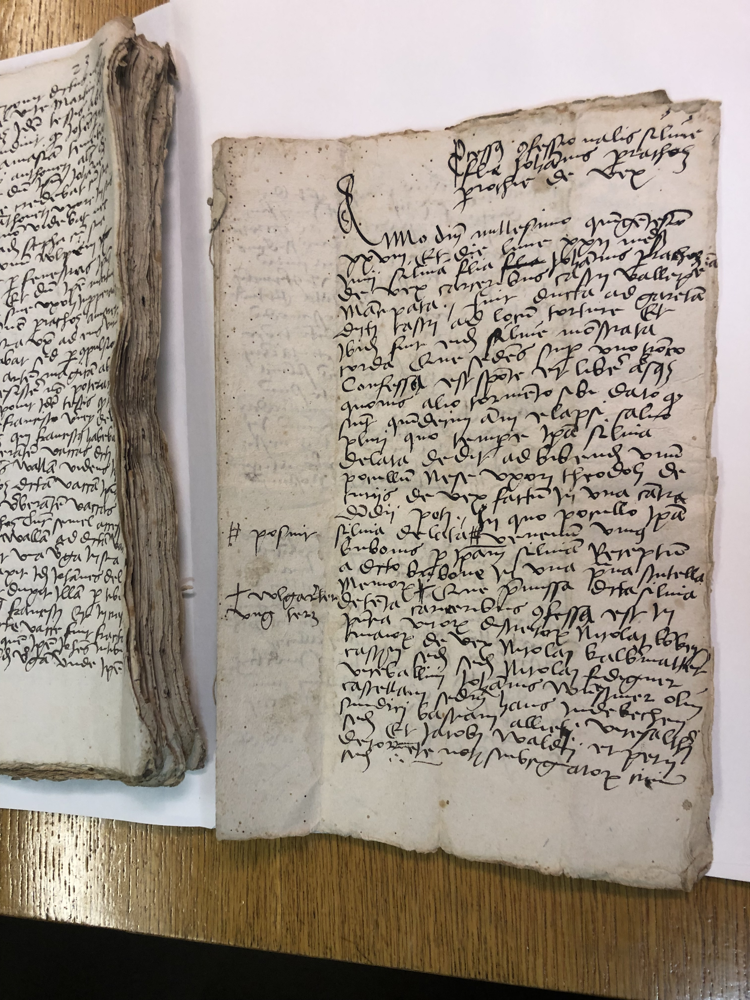 Procédure d’inquisition menée par un descendant de Pierre Torrenté, parchemin des archives de l’évêché de Sion